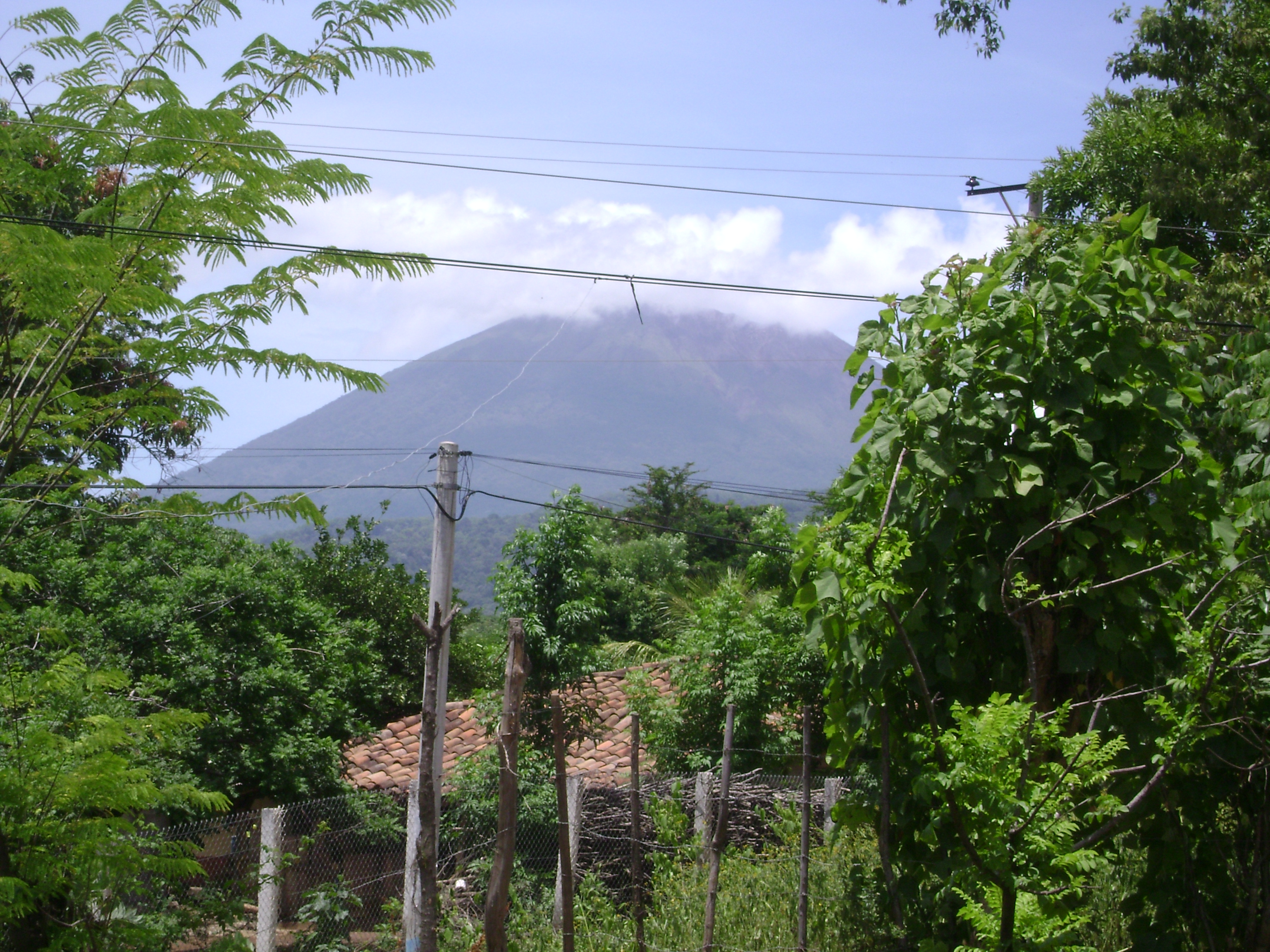 San Miguel Volcano in El Salavdor.